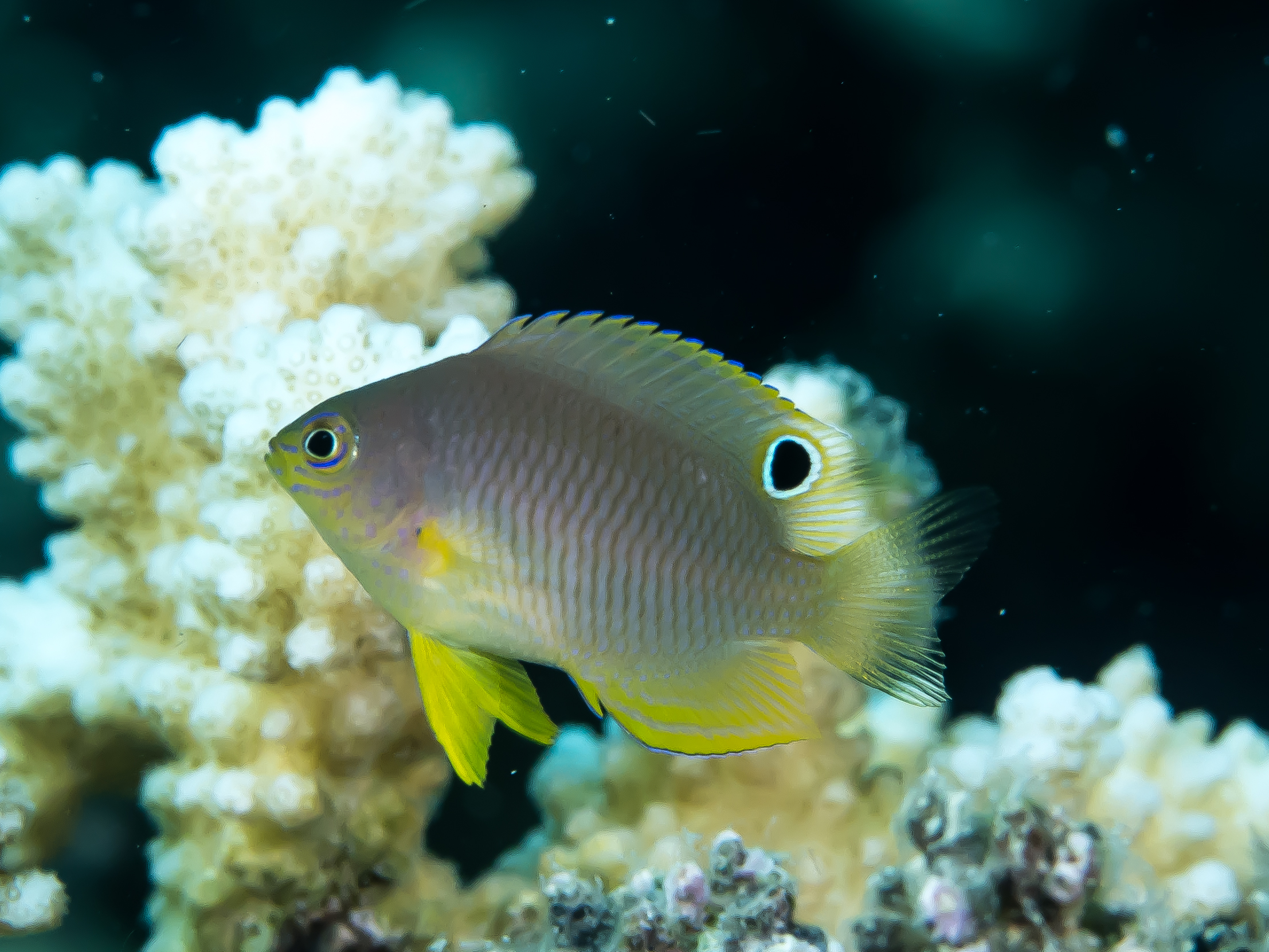 Romblon, Philippines - Ambon damsel juvenile (Pomacentrus amboinensis)